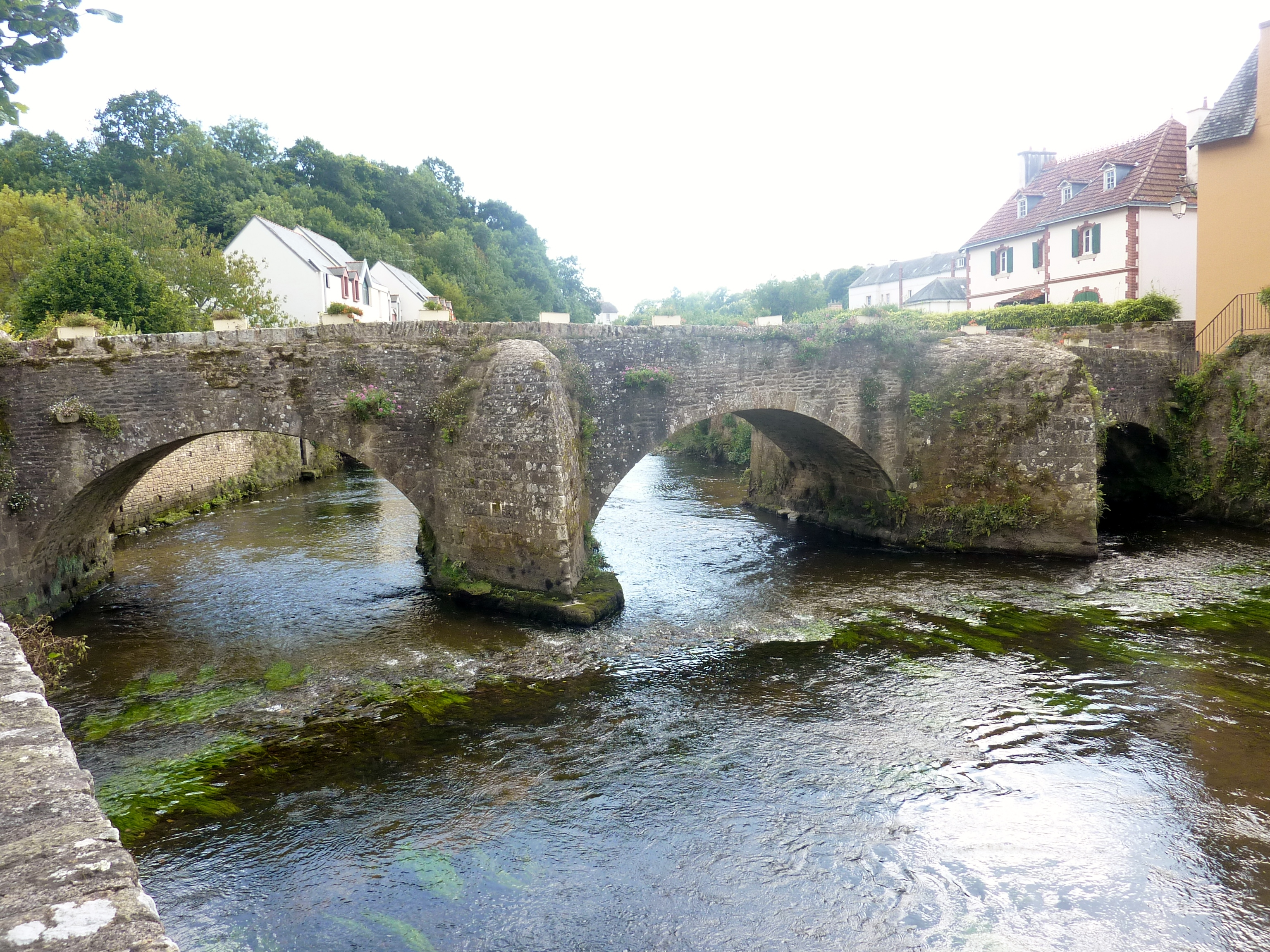 Quimperlé : le pont Lovignon sur l'Ellé ; au premier plan, les restes des enrochements de l'ancien gué qui permettait le franchissement de la rivière avant la construction du pont